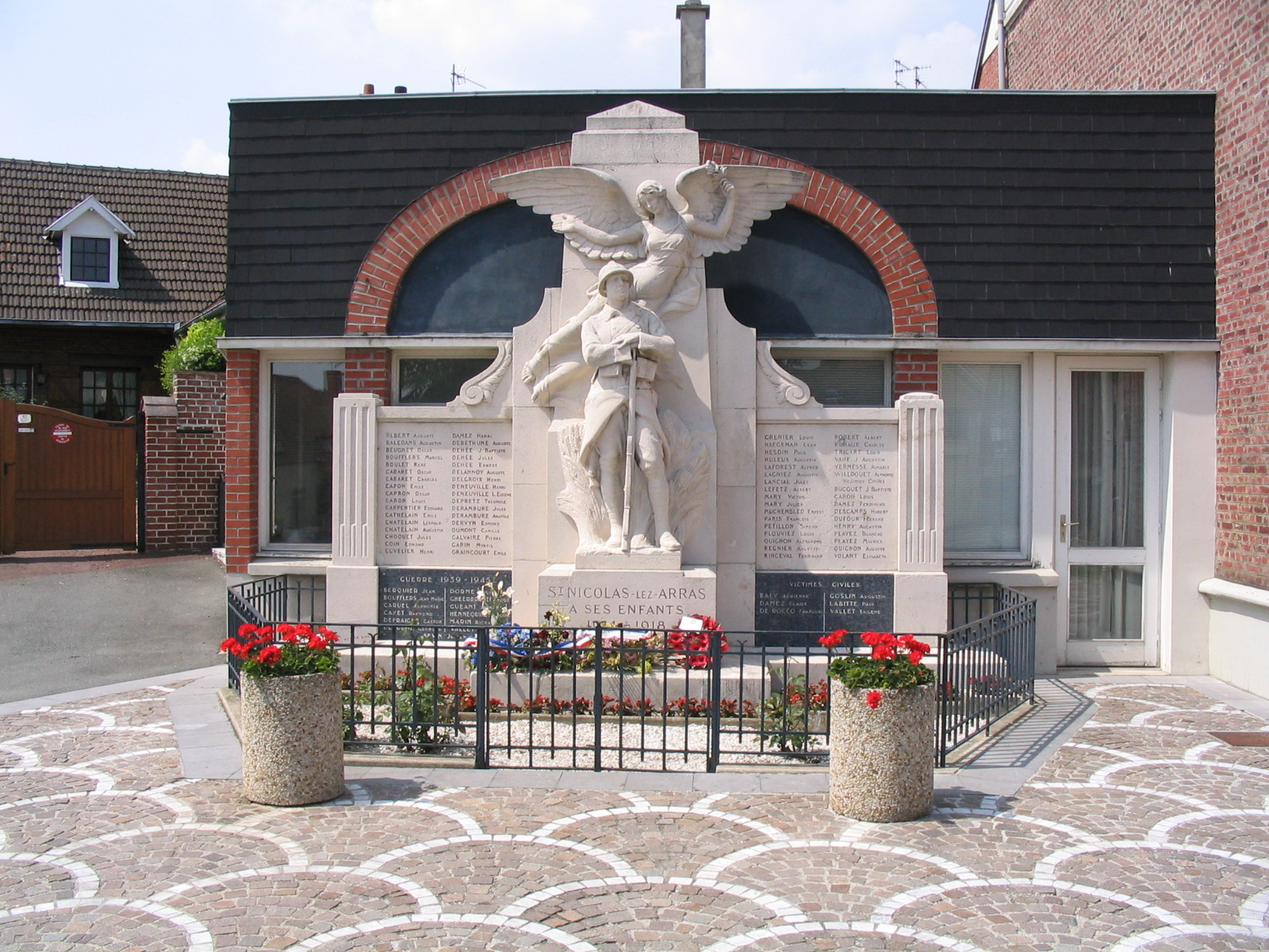 Monument aux morts de Saint-Nicolas